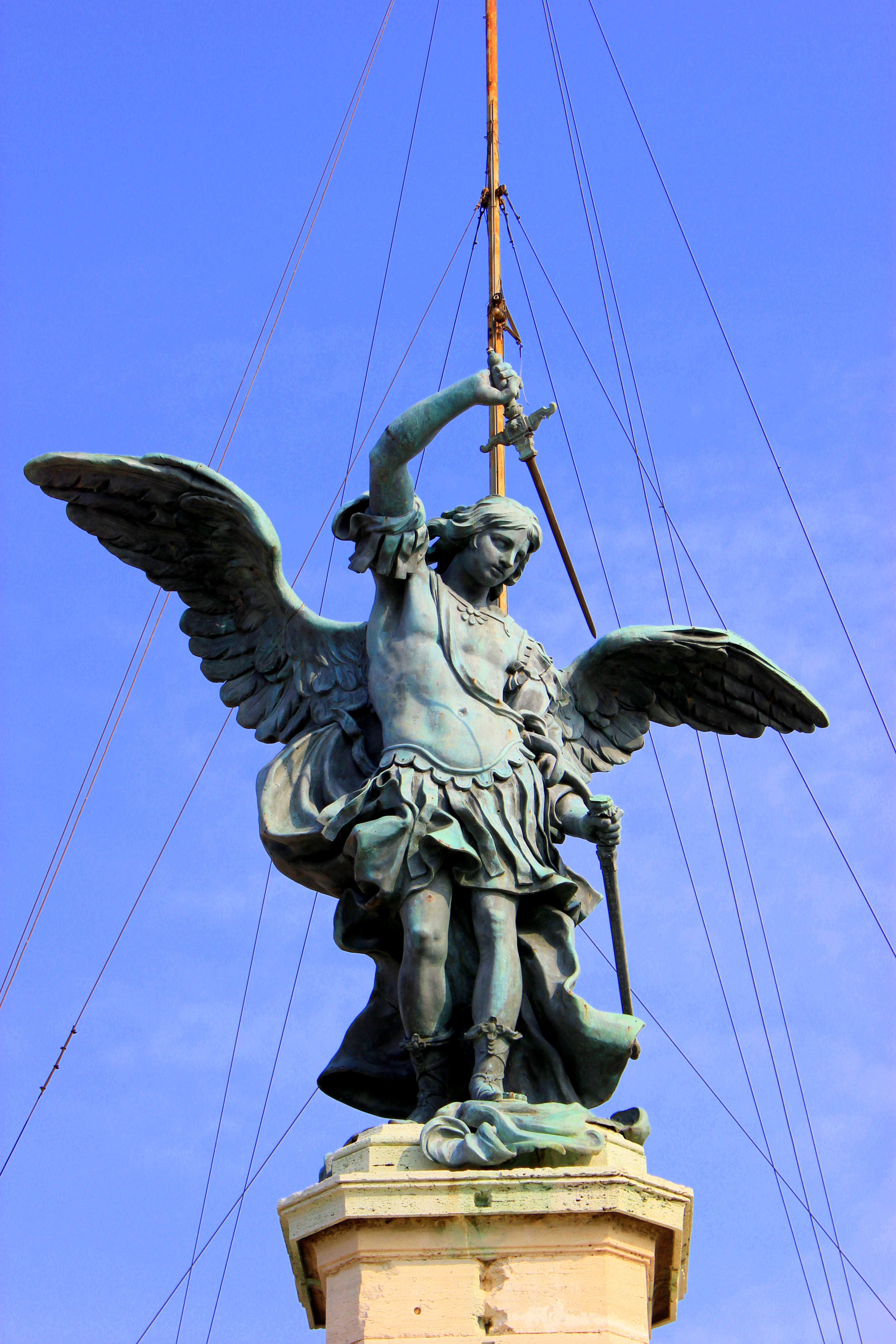 Angel que corona el Castel Sant' Angelo